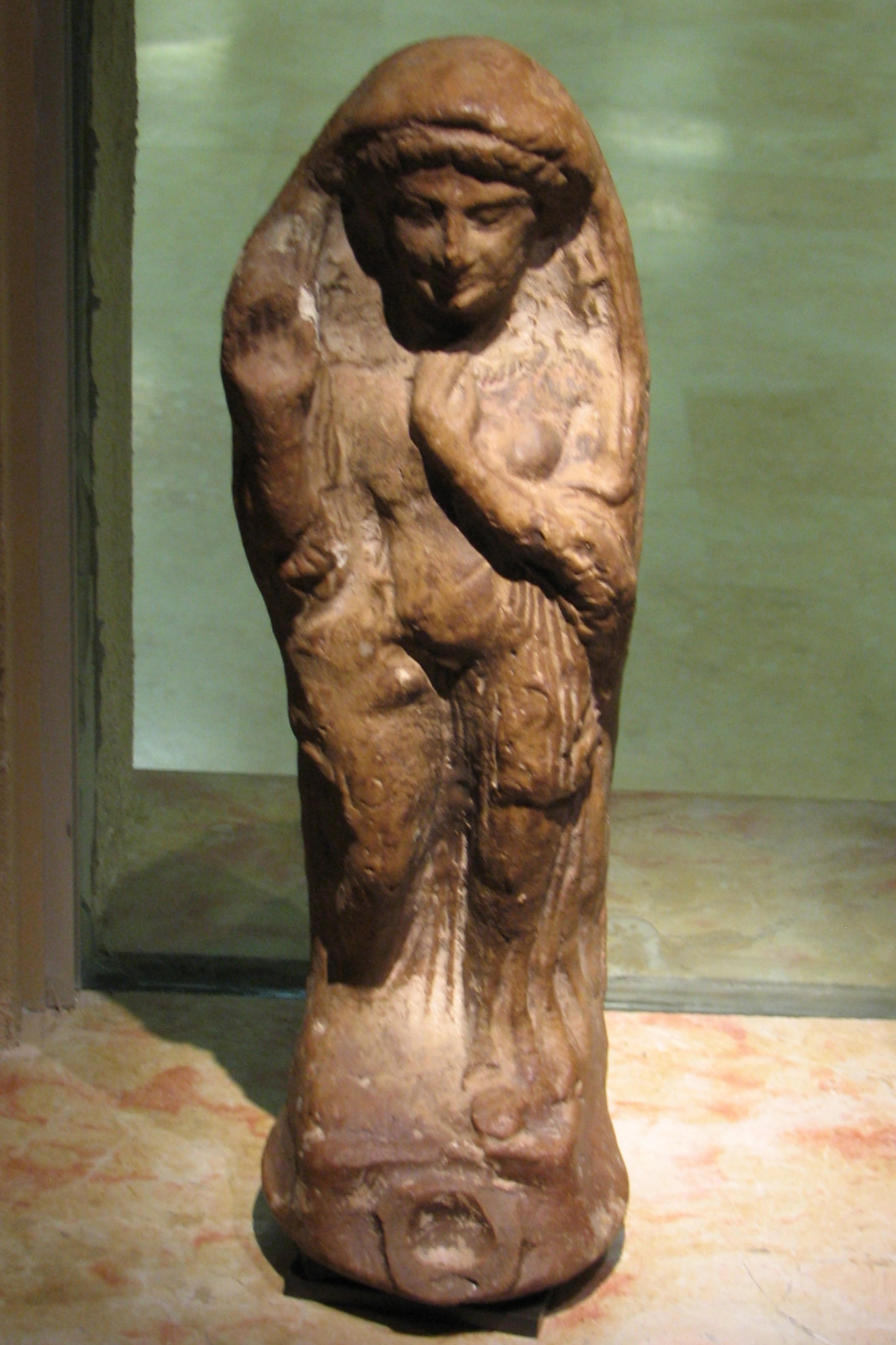 The Reuben and Edith Hecht Museum is a museum located on the grounds of the University of Haifa, Israel. Figurine from the exhibition in the museum depicting goddess Tanit. צלמיות מהעת העתיקה מתקופות שונות, חלק מהתצוגה של מוזיאון הכט שנמצא באוניברסיטת חיפה צלמית בדמות האלה "עשתורת-תנית", אלת הפיריון הפניקית. יד ימין מורמת בתנועת ברכה.